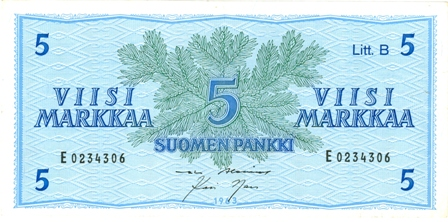 Finnország 5 márka 1963, harmadik (Litt.B) kiadás.